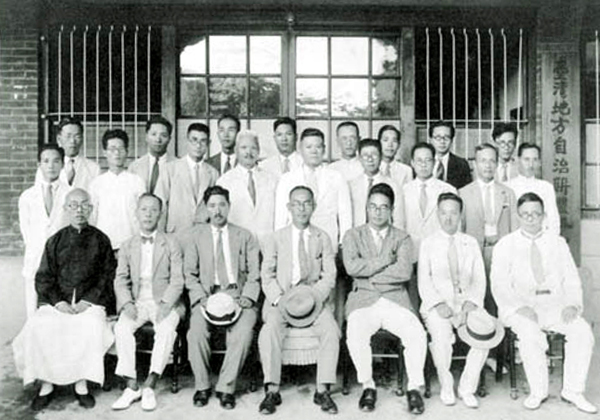 台灣自治聯盟與日本友人合影。攝於1937年以前。